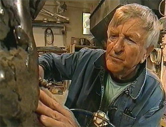 Portrait de Franta